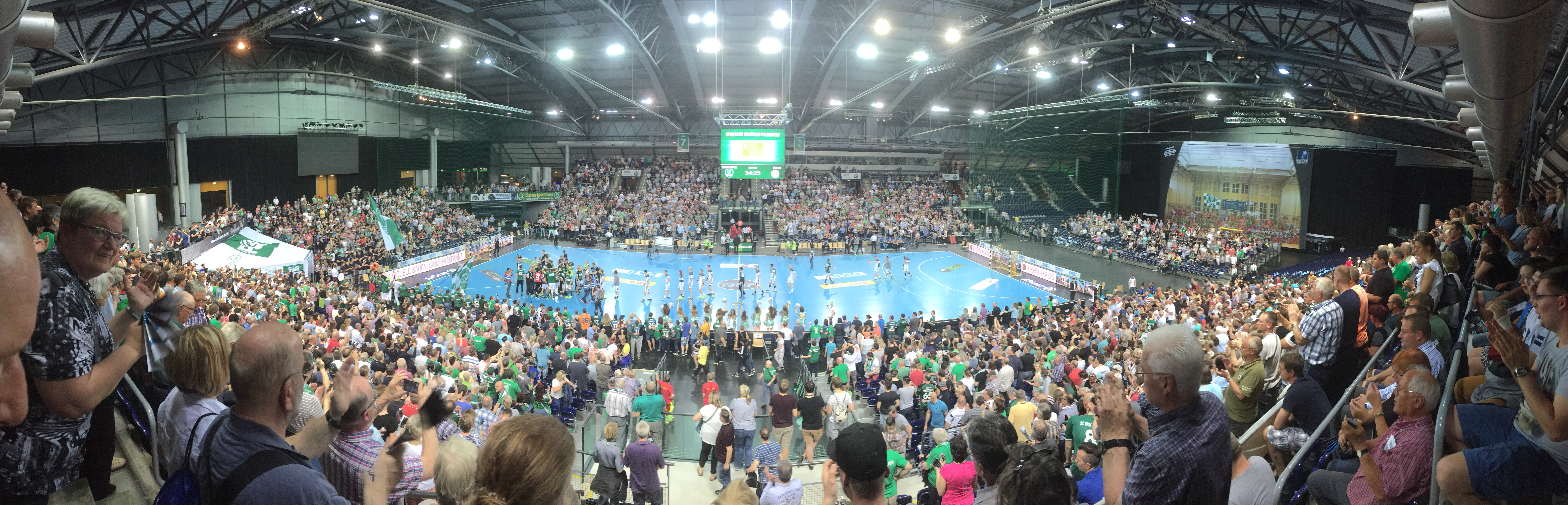 Panoramabild nach dem 34:25 Sieg der SC DHfK Leipizig gegen den THW Kiel